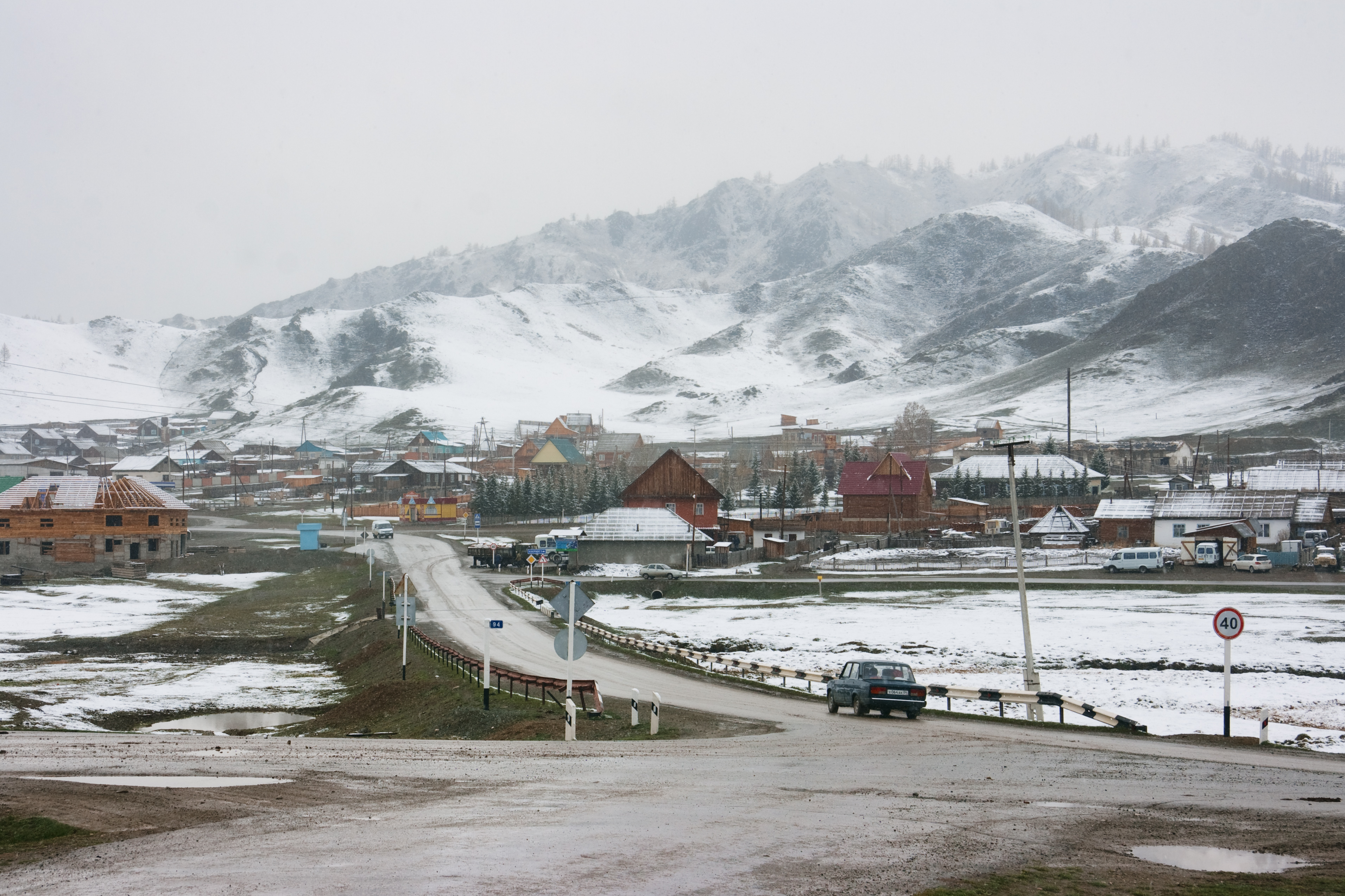 Усть-Кан, Республика Алтай